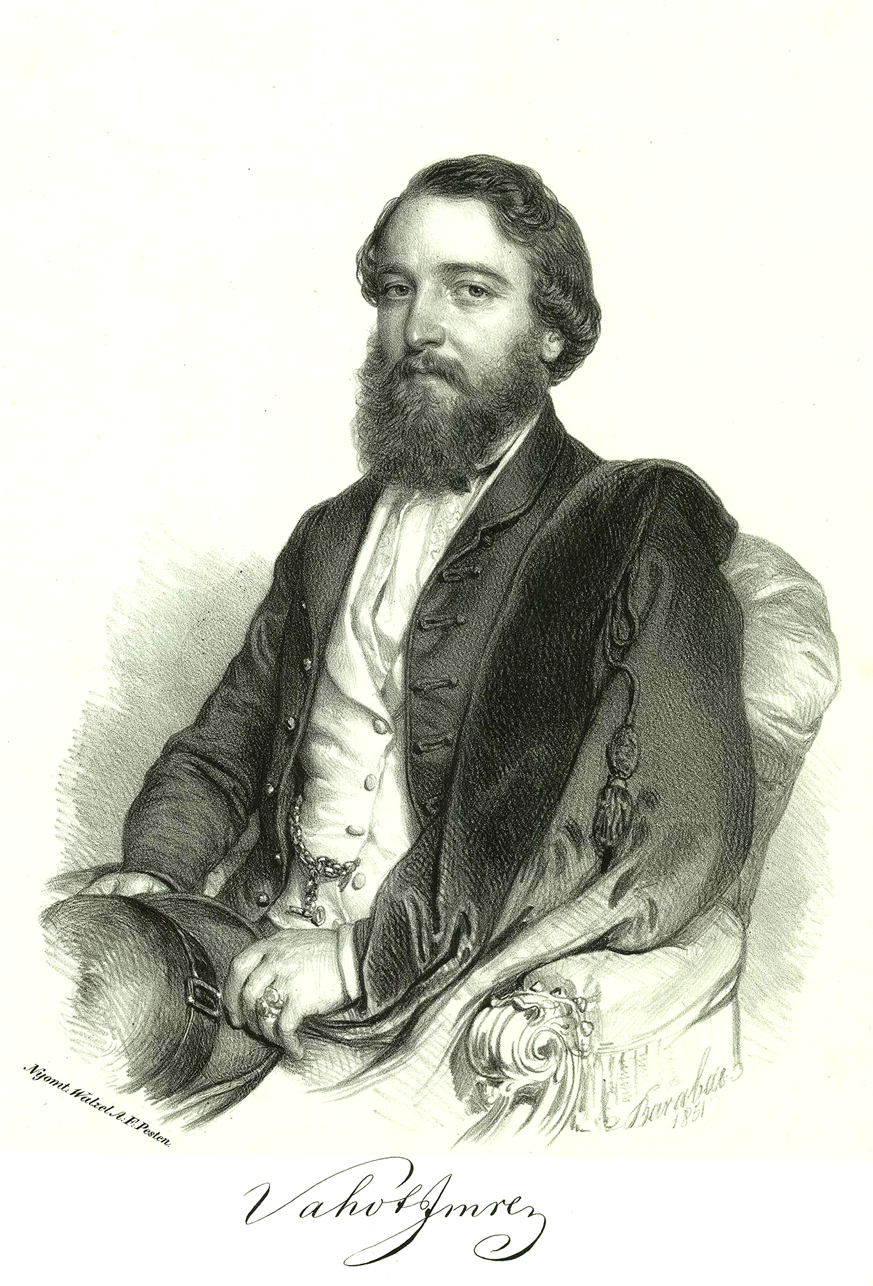 Vachottfalvi Vahot Imre (született: Vachott) (Gyöngyös, 1820. február 25. – Budapest, Budaújlak, 1879. február 11.) magyar ügyvéd, színműíró, szerkesztő.